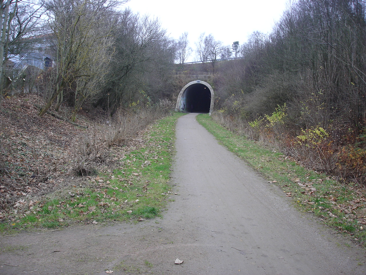 Salling Natursti nærmer sig tunnelen under Holstebrovej